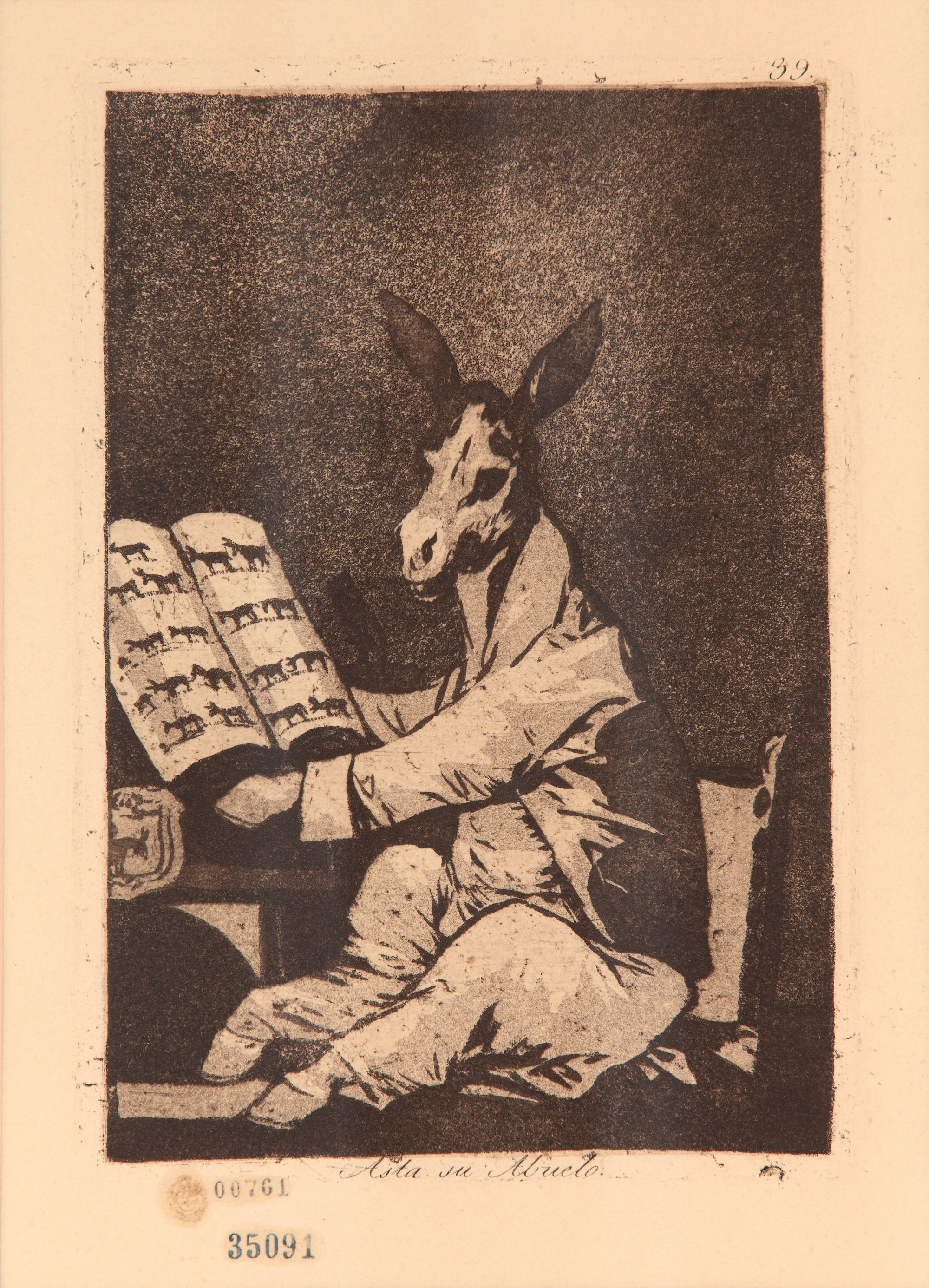 Francisco José de Goya y Lucientes, Asta su abuelo (Serie Caprichos). Siglo XIX. 36,2 x 26,3 cm, plancha: 21,5 x 15 cm, aguafuerte sobre papel. Inv. 1174.